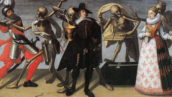 Танок смерті частина цикла роботи художника зі Швейцарії Якоба фон Віля